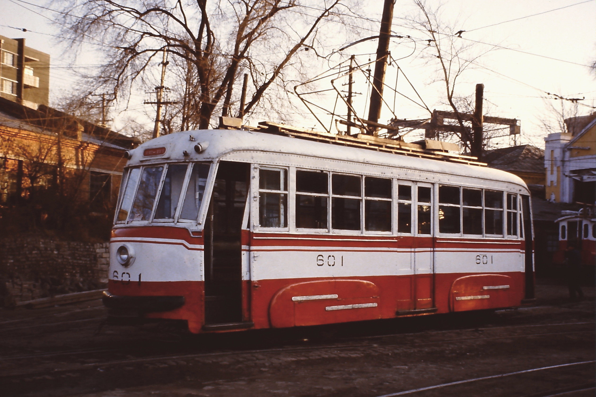 Straßenbahn 601 (Anshan)